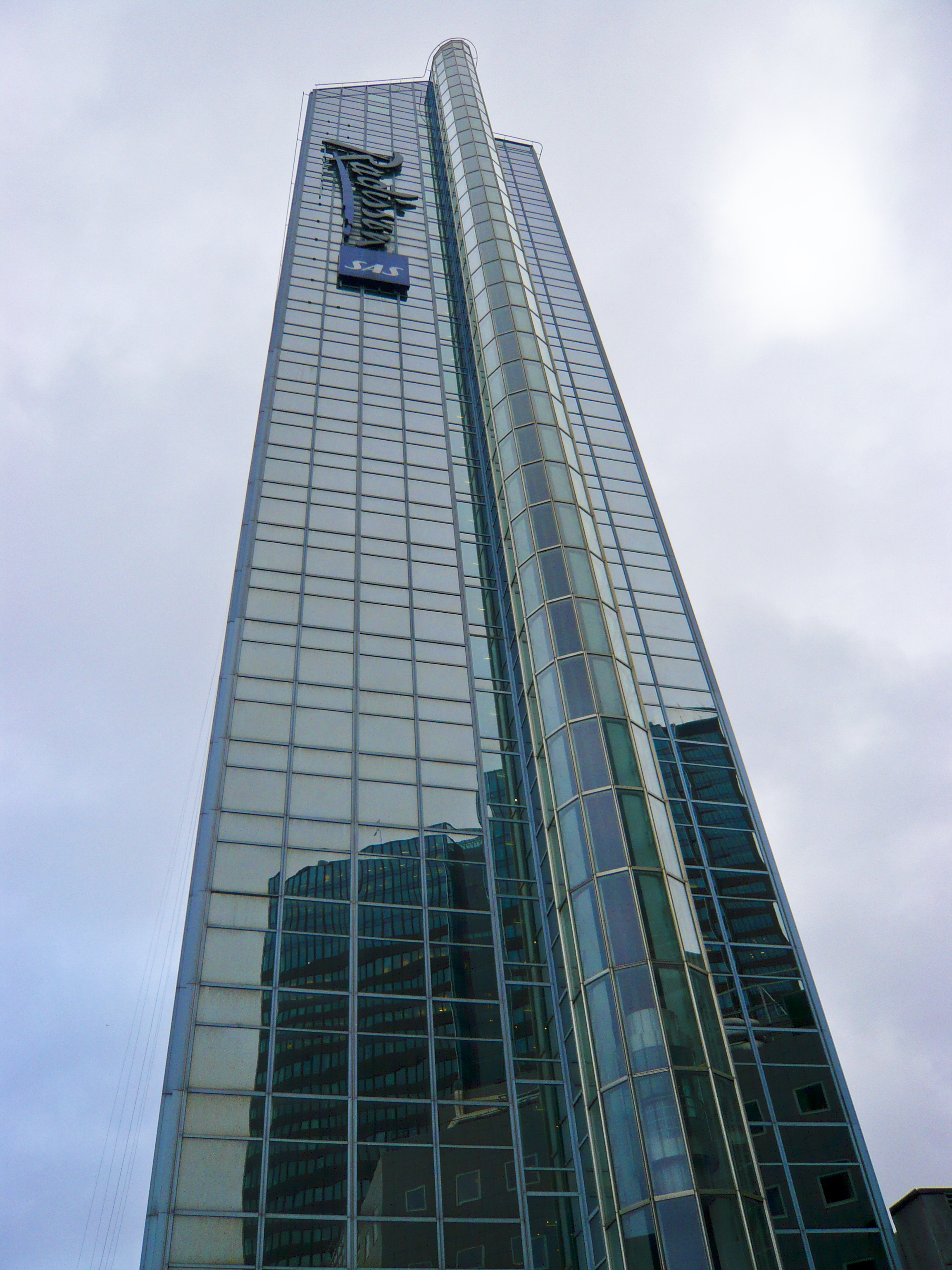 Radisson SAS Plaza Hotel, Oslo